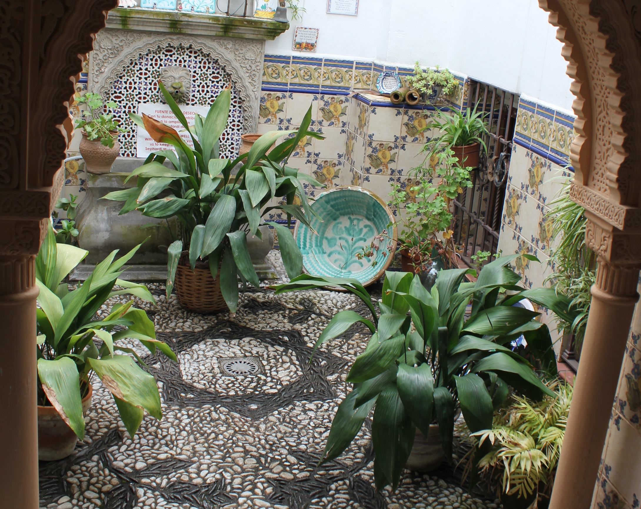 Patio del Museo Sefardí de Granada